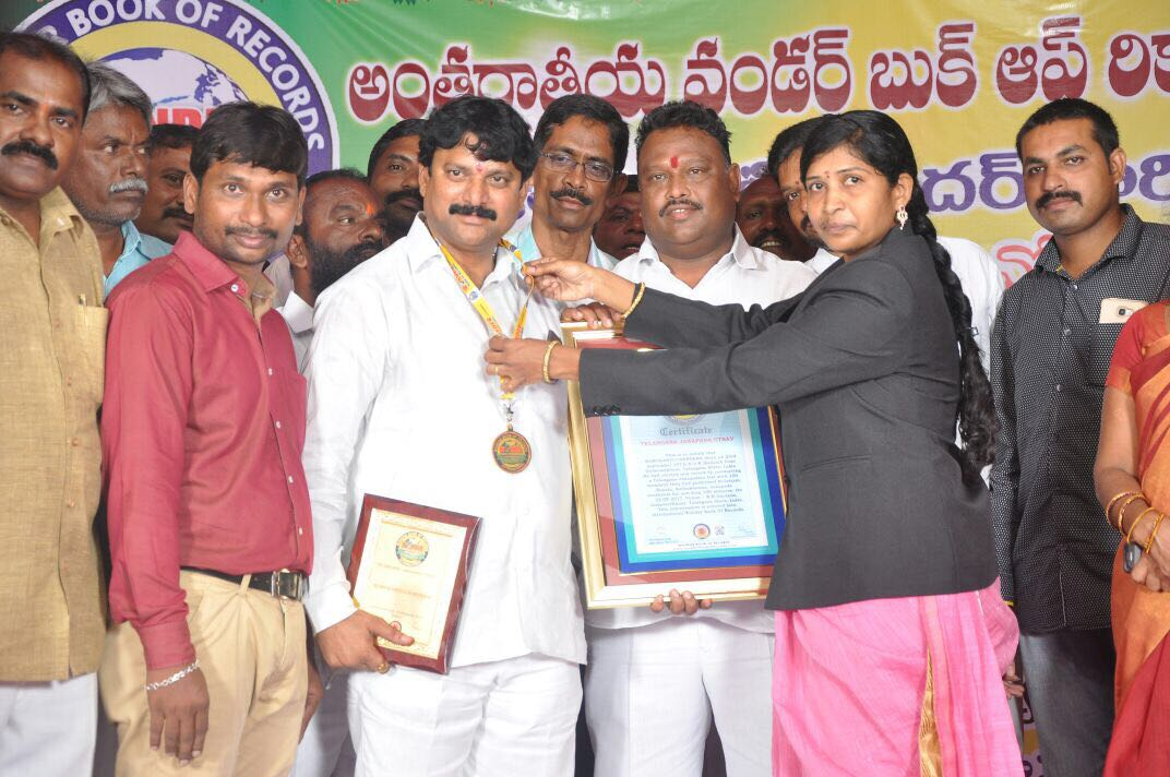 వండర్ బుక్ ఆఫ్ రికార్డ్ ప్రశంసా పత్రము బహుకరణం